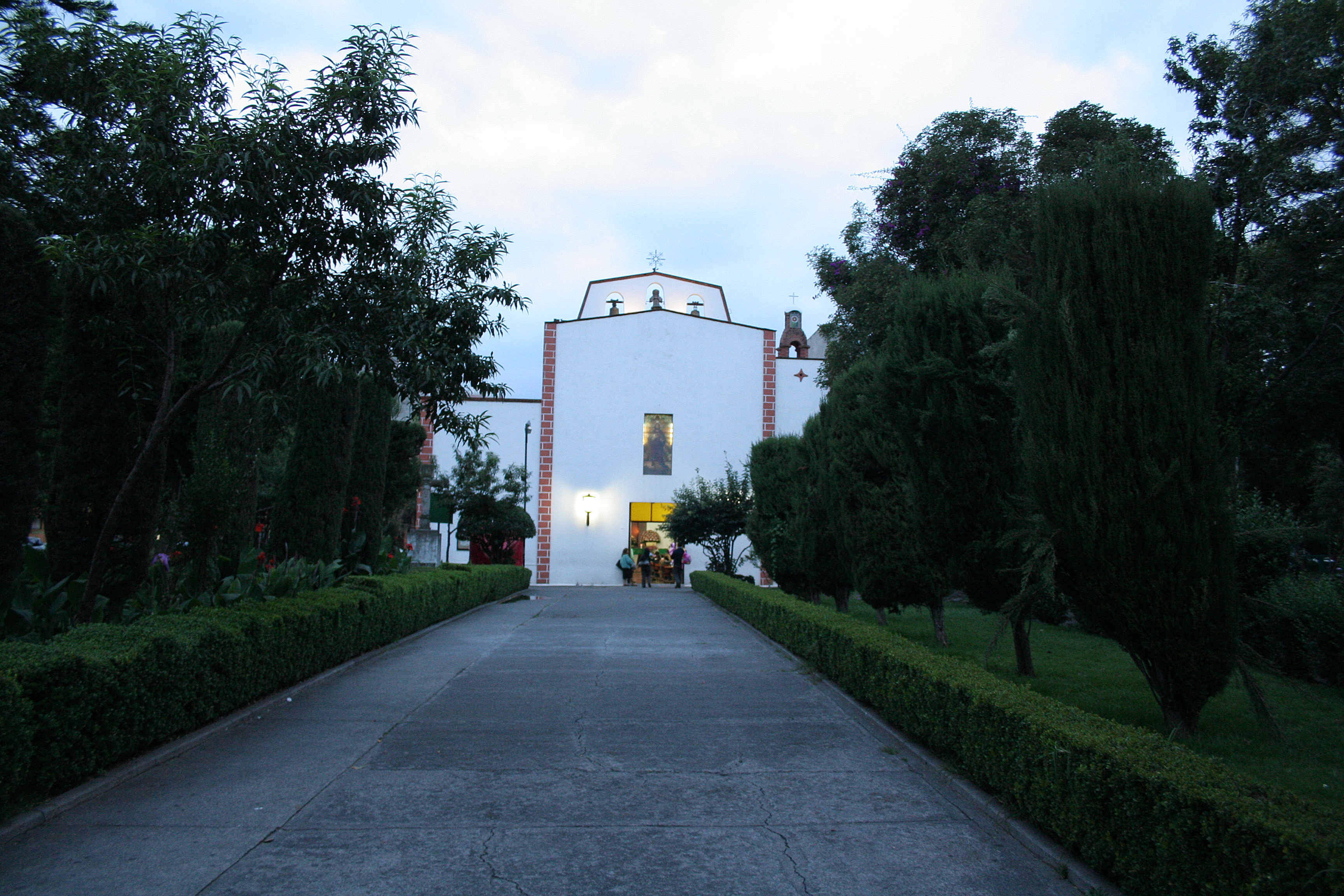 Vista panorámica del pasillo central que lleva a la Parroquia Señor del Buen Despacho